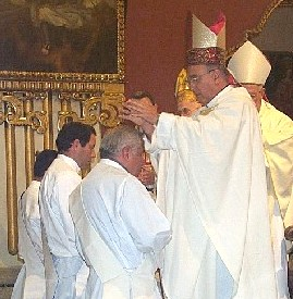 ordenacion